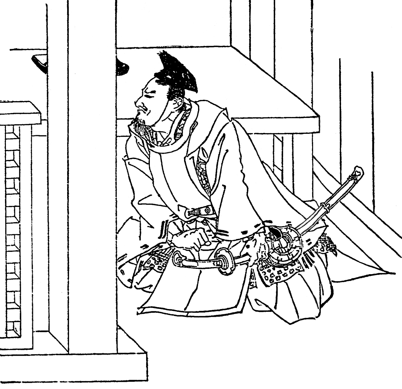 平家貞。平安時代末期の武将。／江戸時代『前賢故実』より。画：菊池容斎